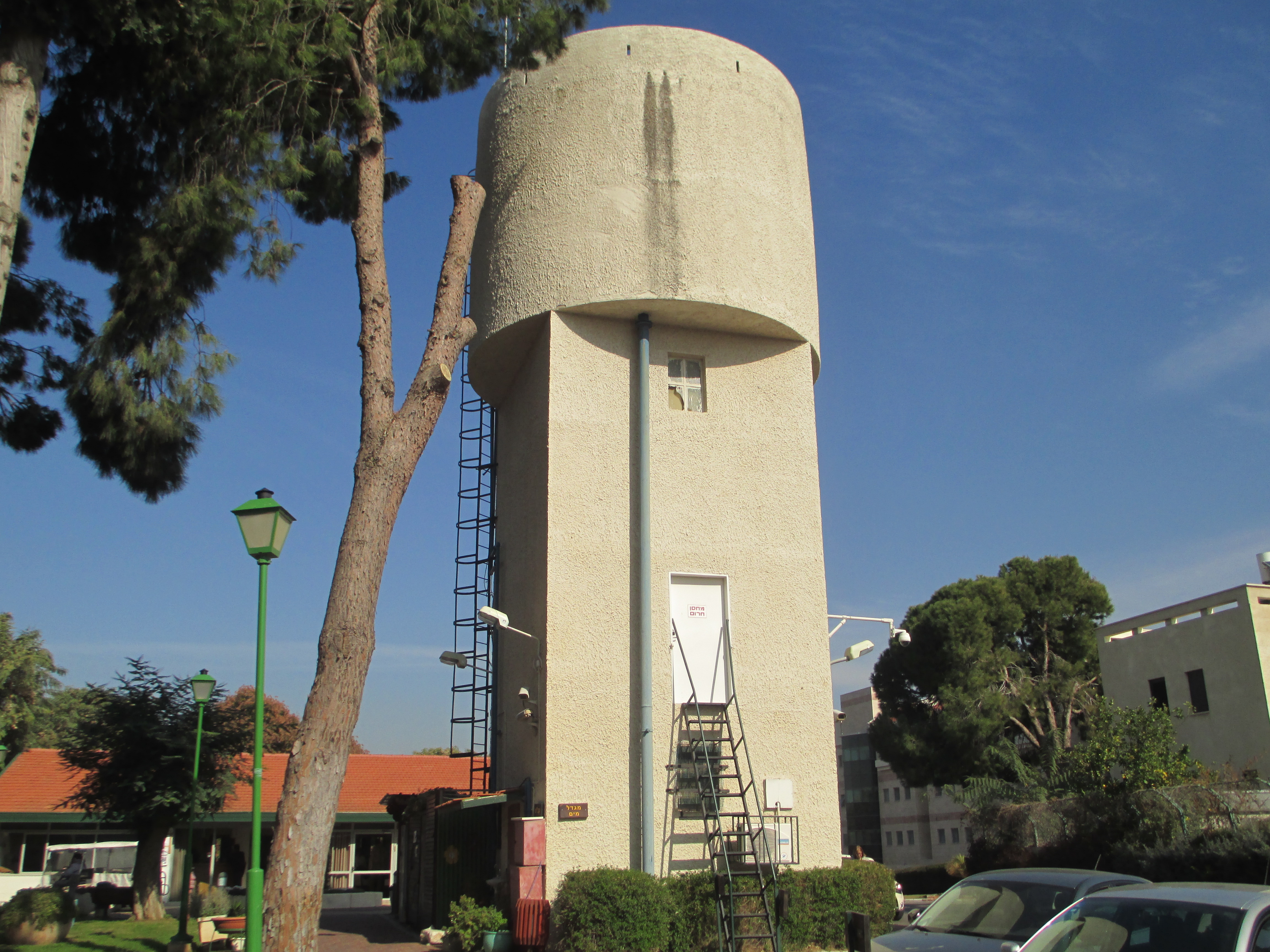 מגדל המים של קיבוץ אפעל-כיום בתחום כפר הגימלאים נווה אפעל